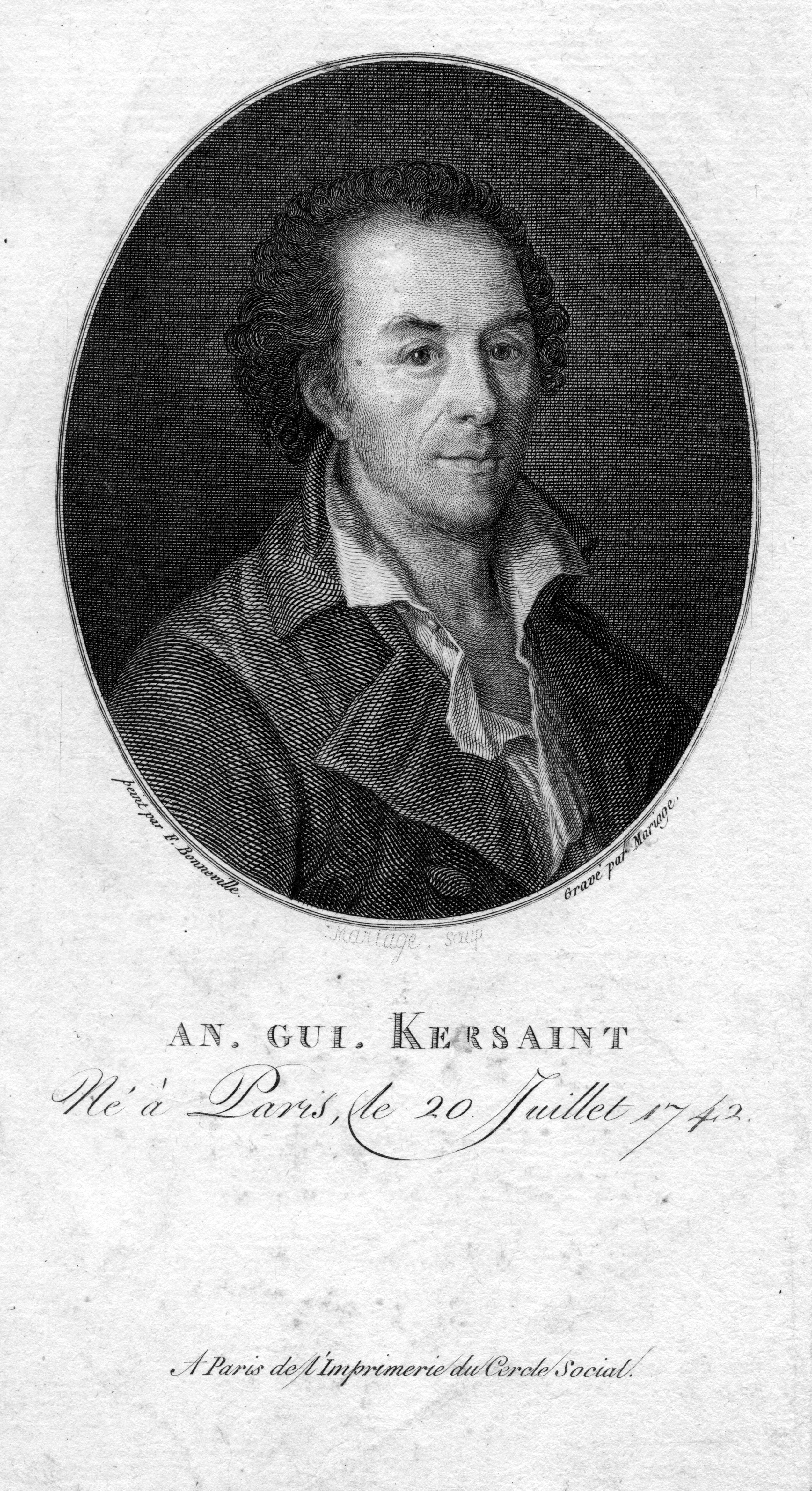 portrait gravé